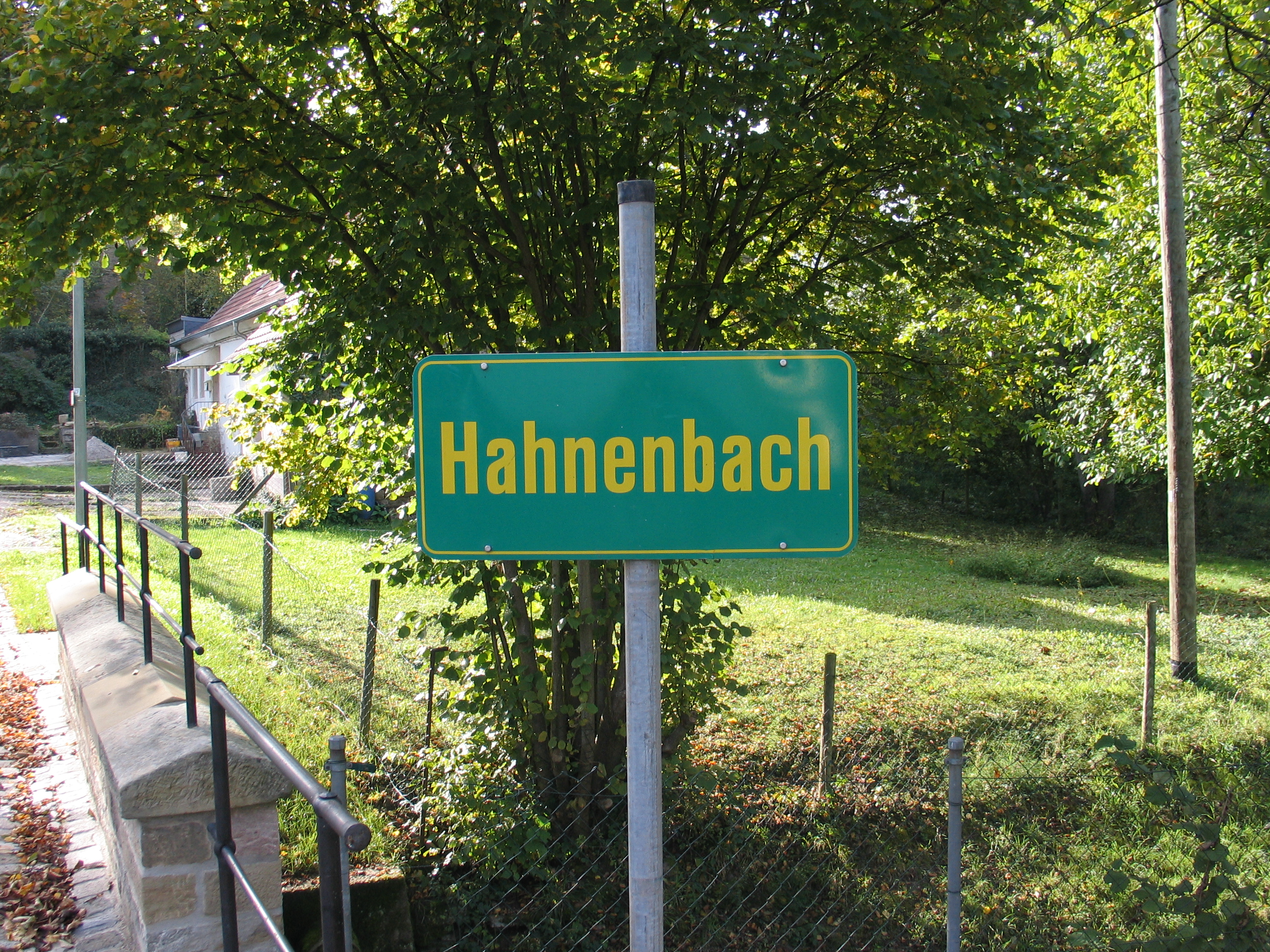 Ein Schild, das den Hahnenbach als solchen in Rudolphskirchen identifiziert.